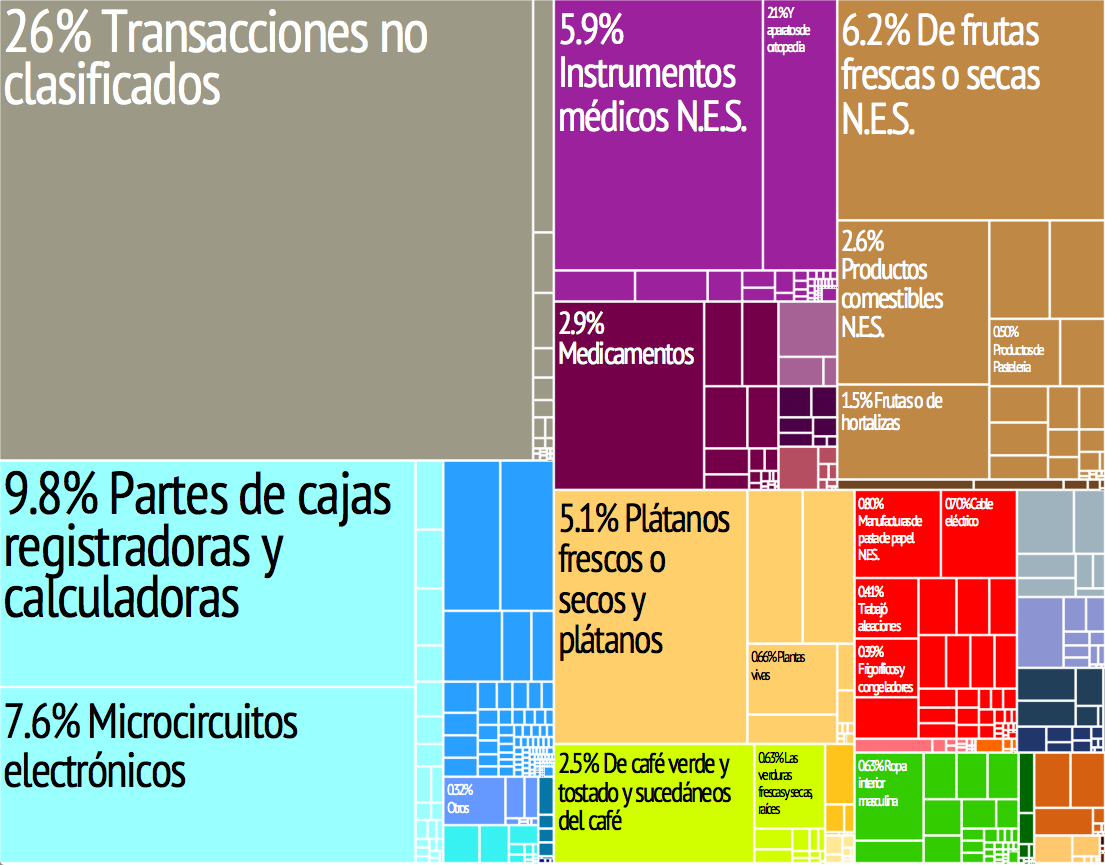 Representación gráfica de los productos de exportación de Costa Rica en 2009 en 28 categorías codificadas por color. Cada recuadro de color representa un producto y su tamaño es proporcional a la participación que ese producto representa dentro del total de las exportaciones del país.